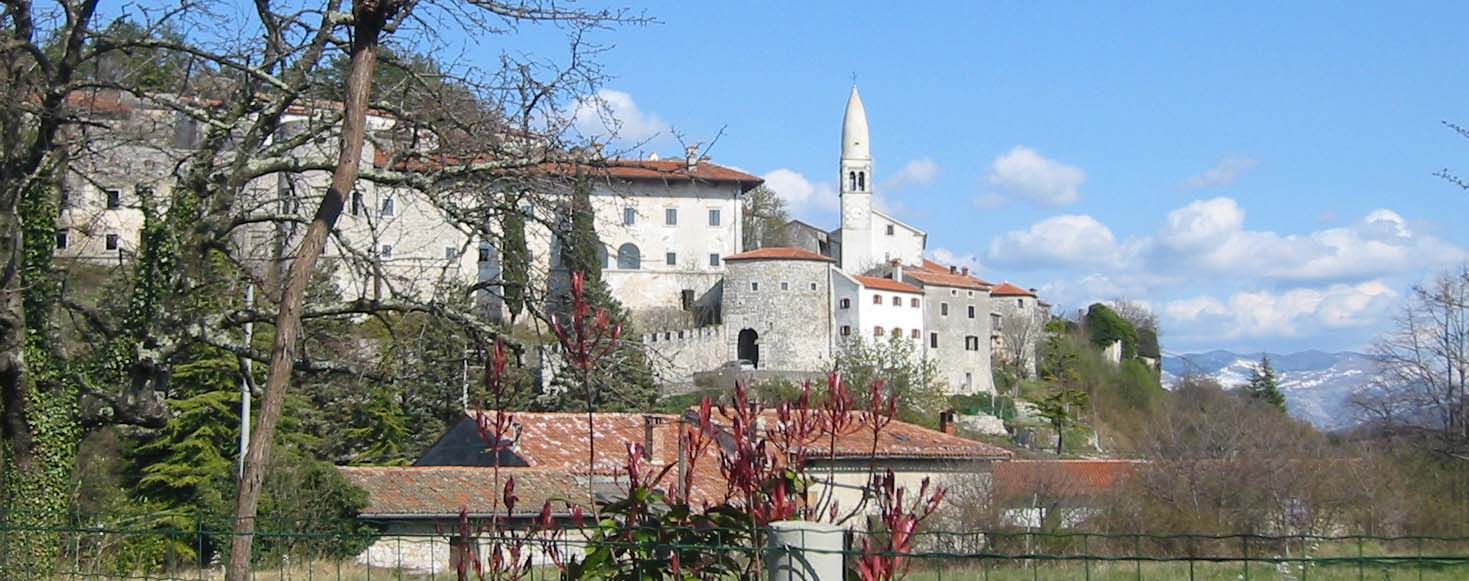 Štanjel, a karst village (town) in Slovenia photo:Ziga 12:05, 16 April 2007 (UTC)